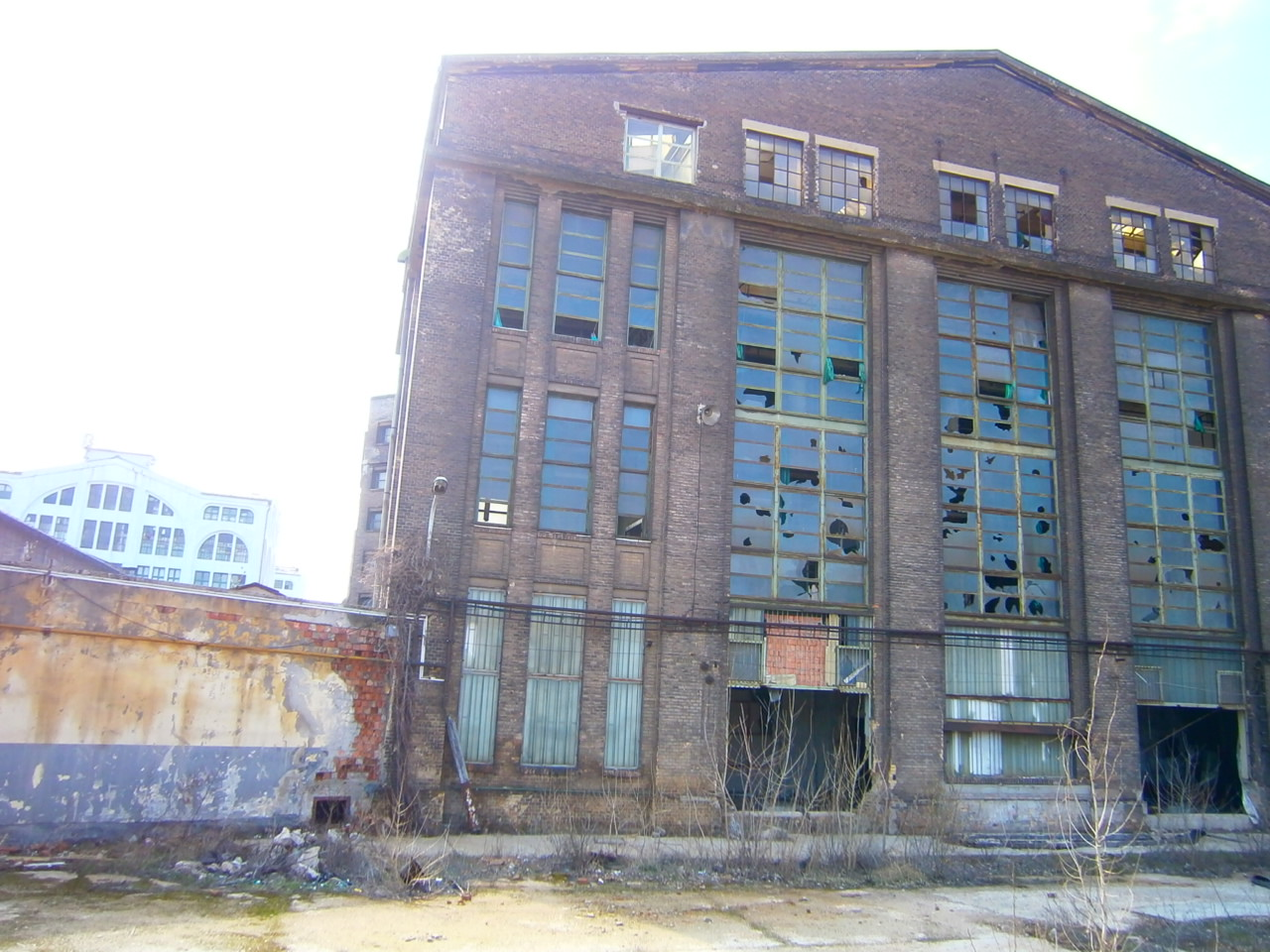 Budapesti FÉG épülete.